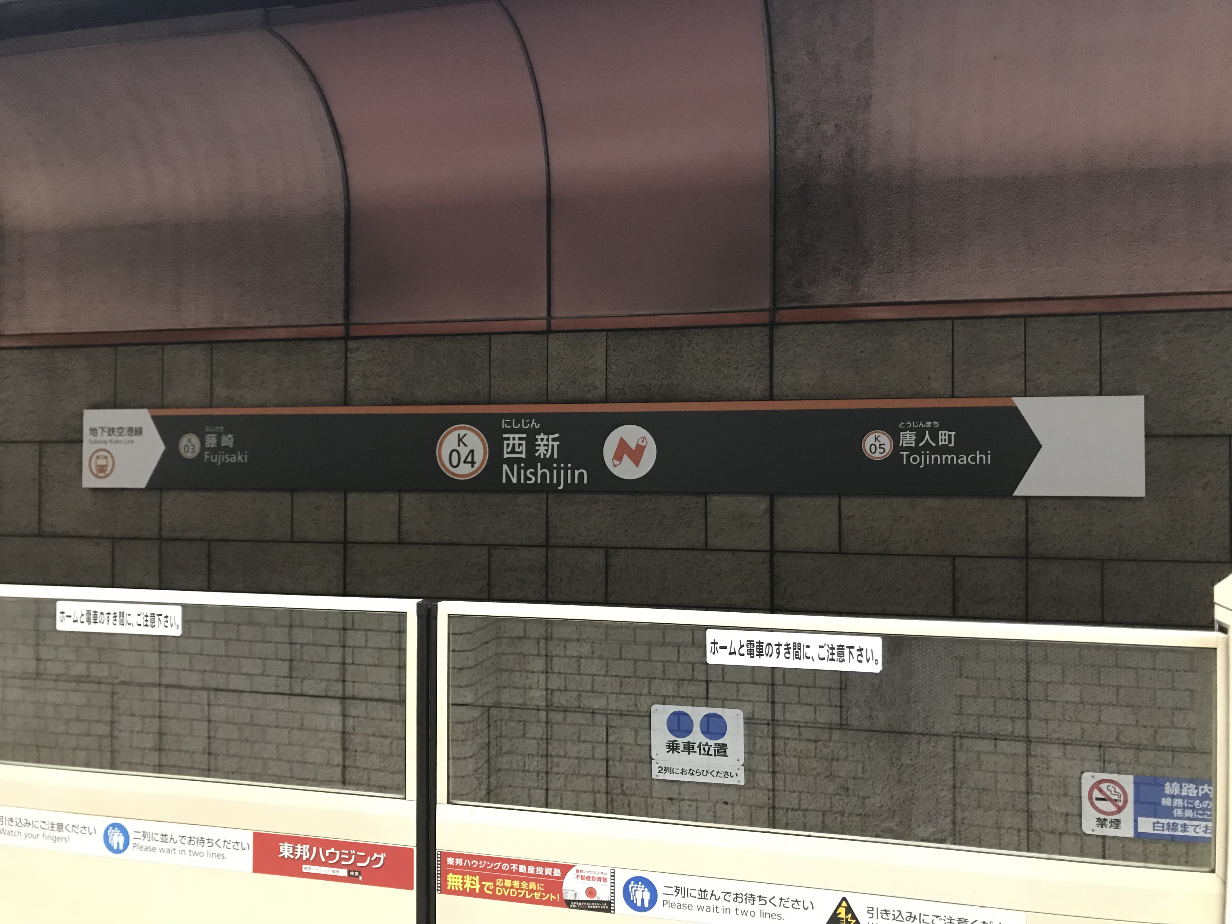 西新駅の駅名標。イラストは「N」の形にペンと鉛筆